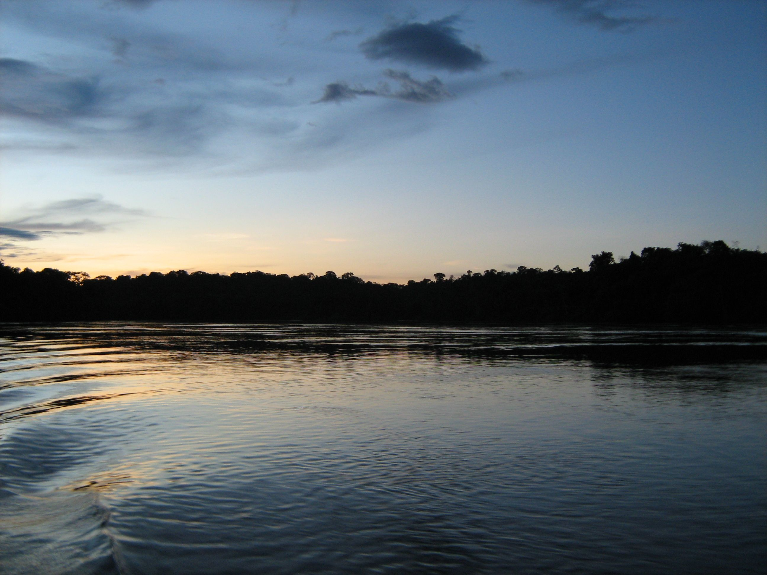 Paisagem amazonia